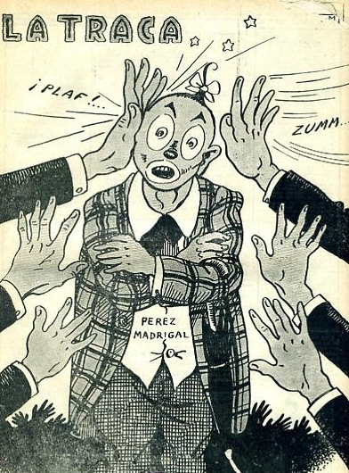 Portada de la Traca de l'època republicana (abans de la Guerra)